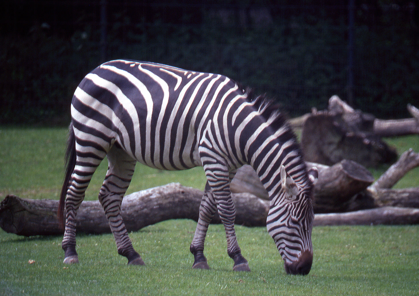 Equus quagga boehmi